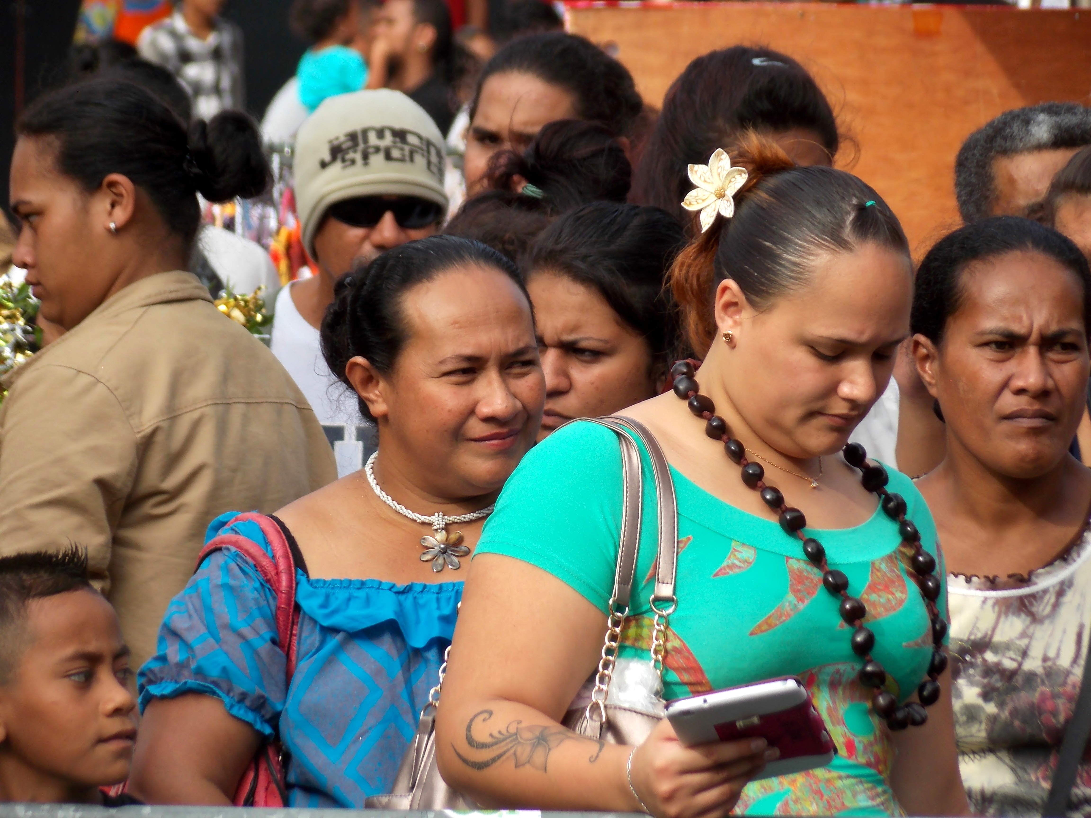 Wallisiens et Futuniens de Nouvelle-Calédonie à Nouméa